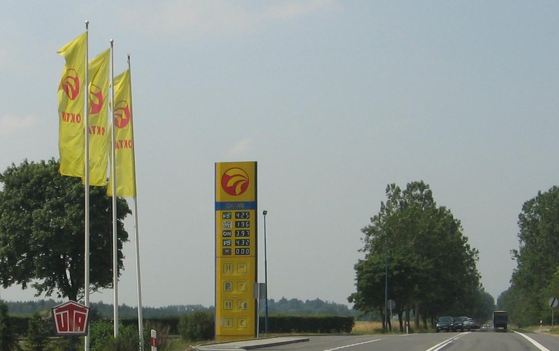 Oktan, gaz station , Poland